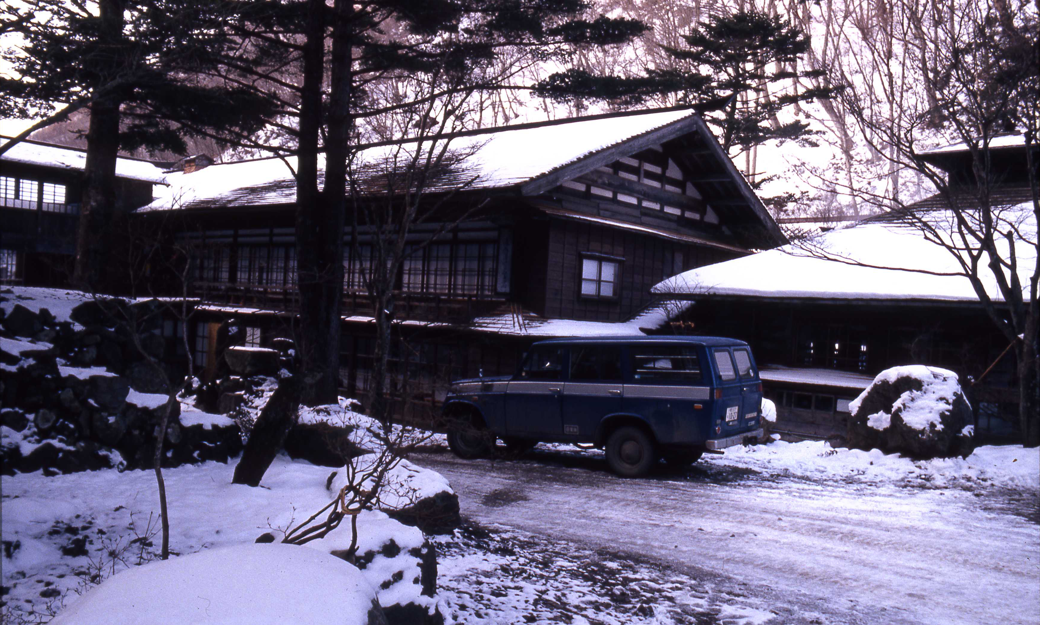 法師温泉長寿館外観